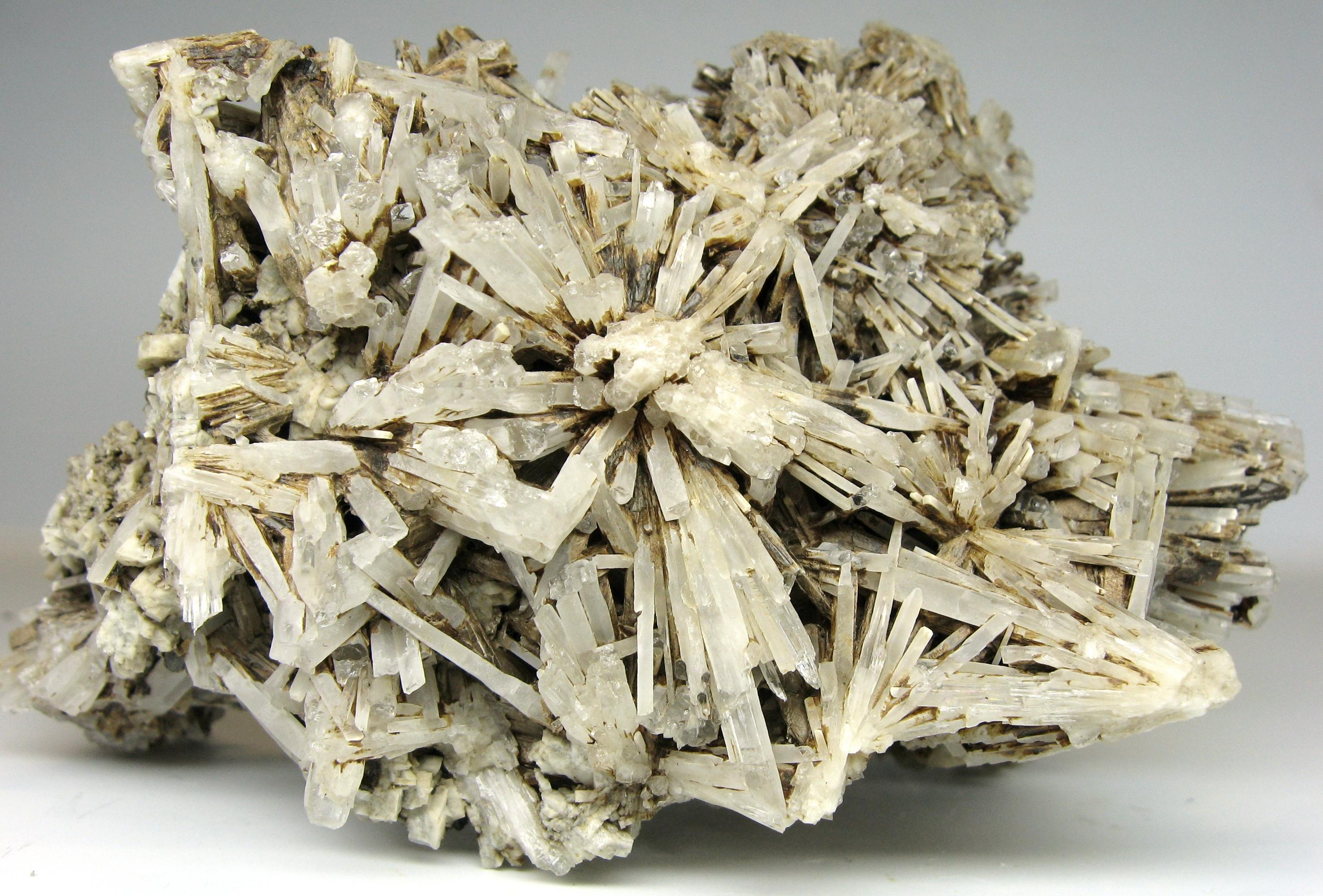 Натролит - агрегат шестоватых кристаллов. Пик Марченко, Хибинские горы, Мурманская область.